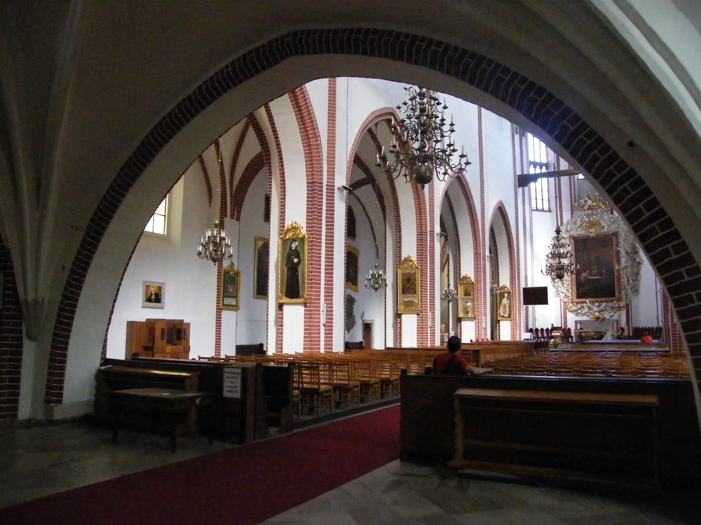 Wrocław, kościół p.w. Bożego Ciała, 2 ćw. XV, wnętrze